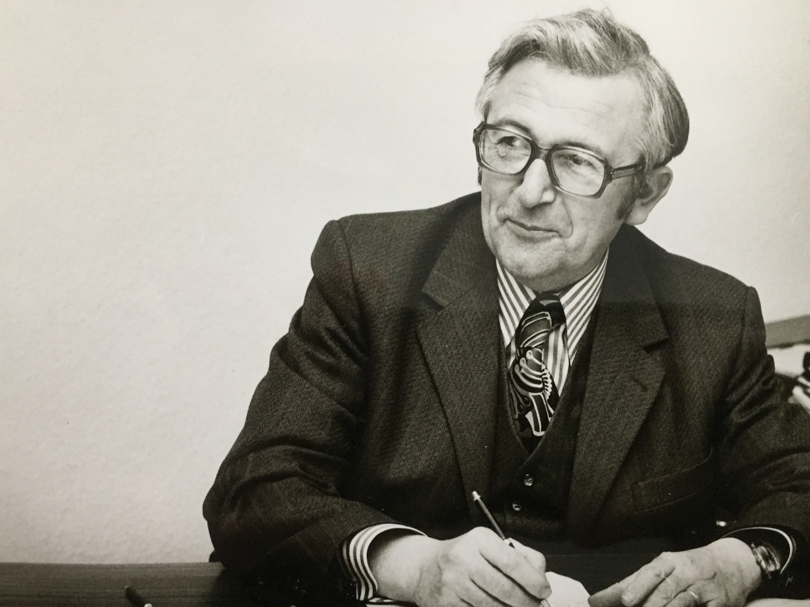 Bürgermeister Verbandsgemeinde Absenz-Obermoschel